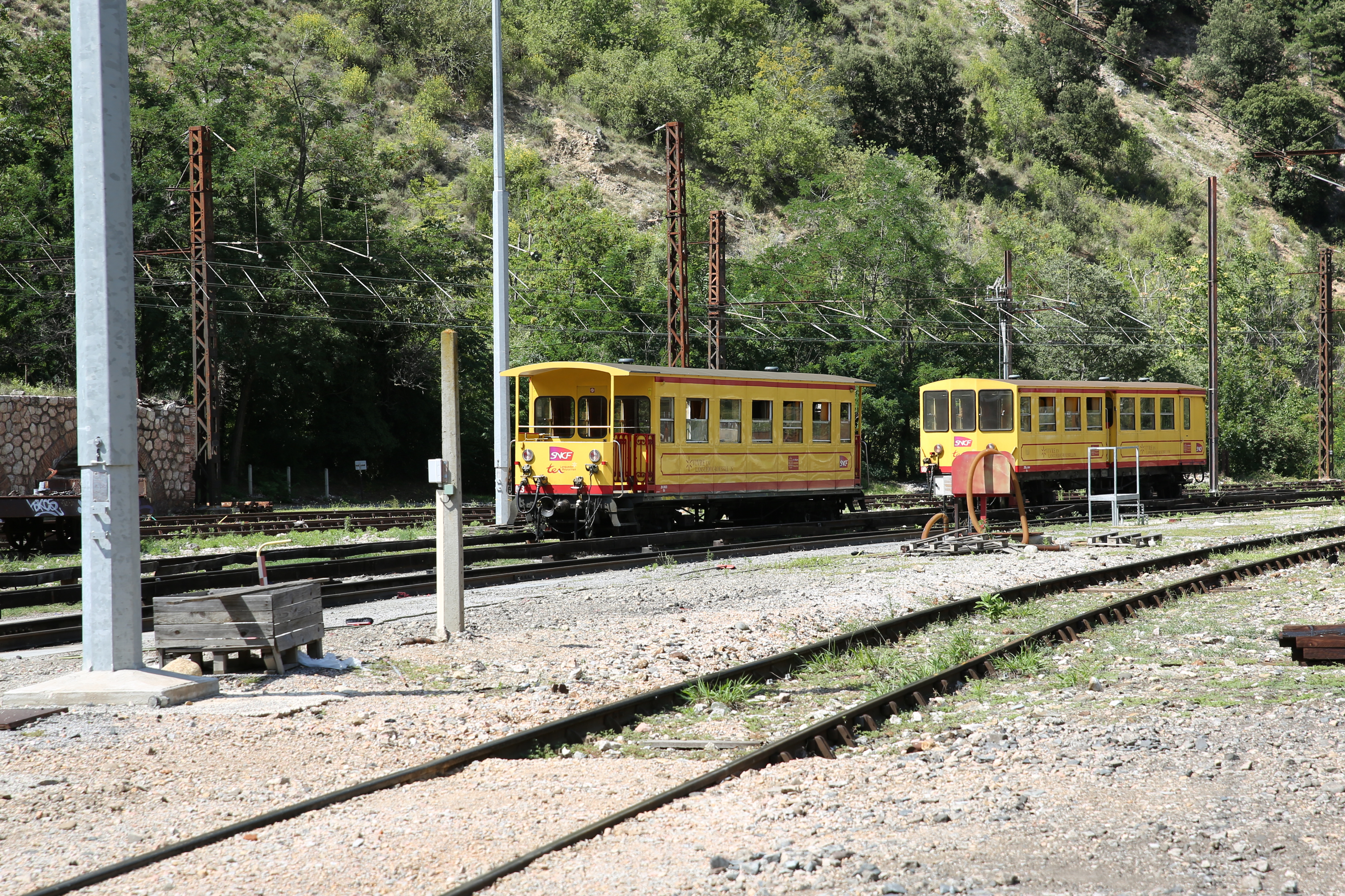 Gare de Villefranche-de-Conflent